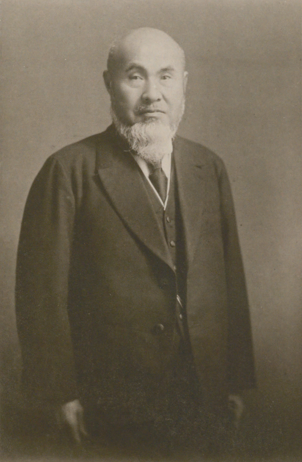 Portrait of Watanabe Sukesaku (渡辺祐策, 1864 – 1934)